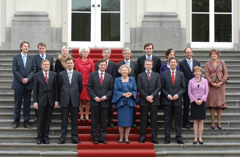 Kabinet-Balkenende IV